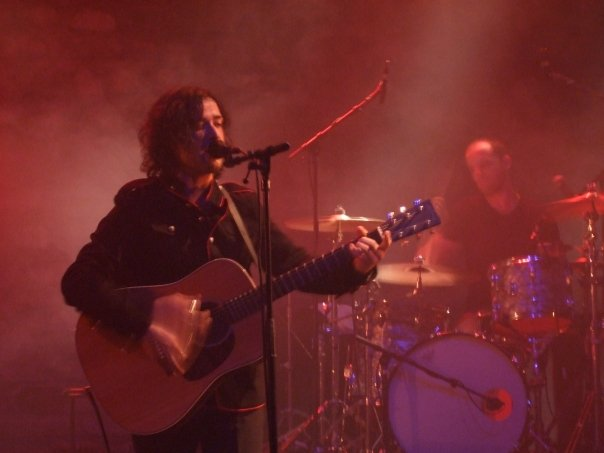 Café de la Danse - 16 novembre 2009